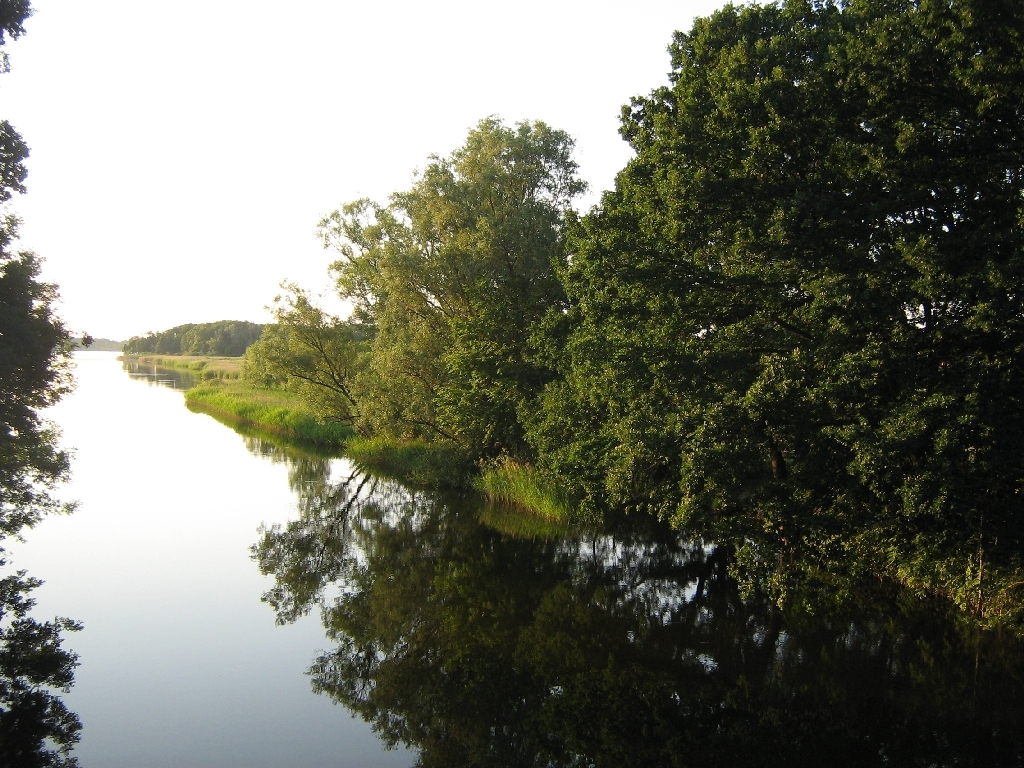 Müritz-Havel Kanal bei Vietzen im Landkreis Mecklenburg-Strelitz, (Mecklenburg-Vorpommern, Germany) kürz vor der Müritz